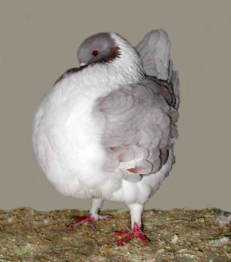 Modena, English (Lavender Gazzi)